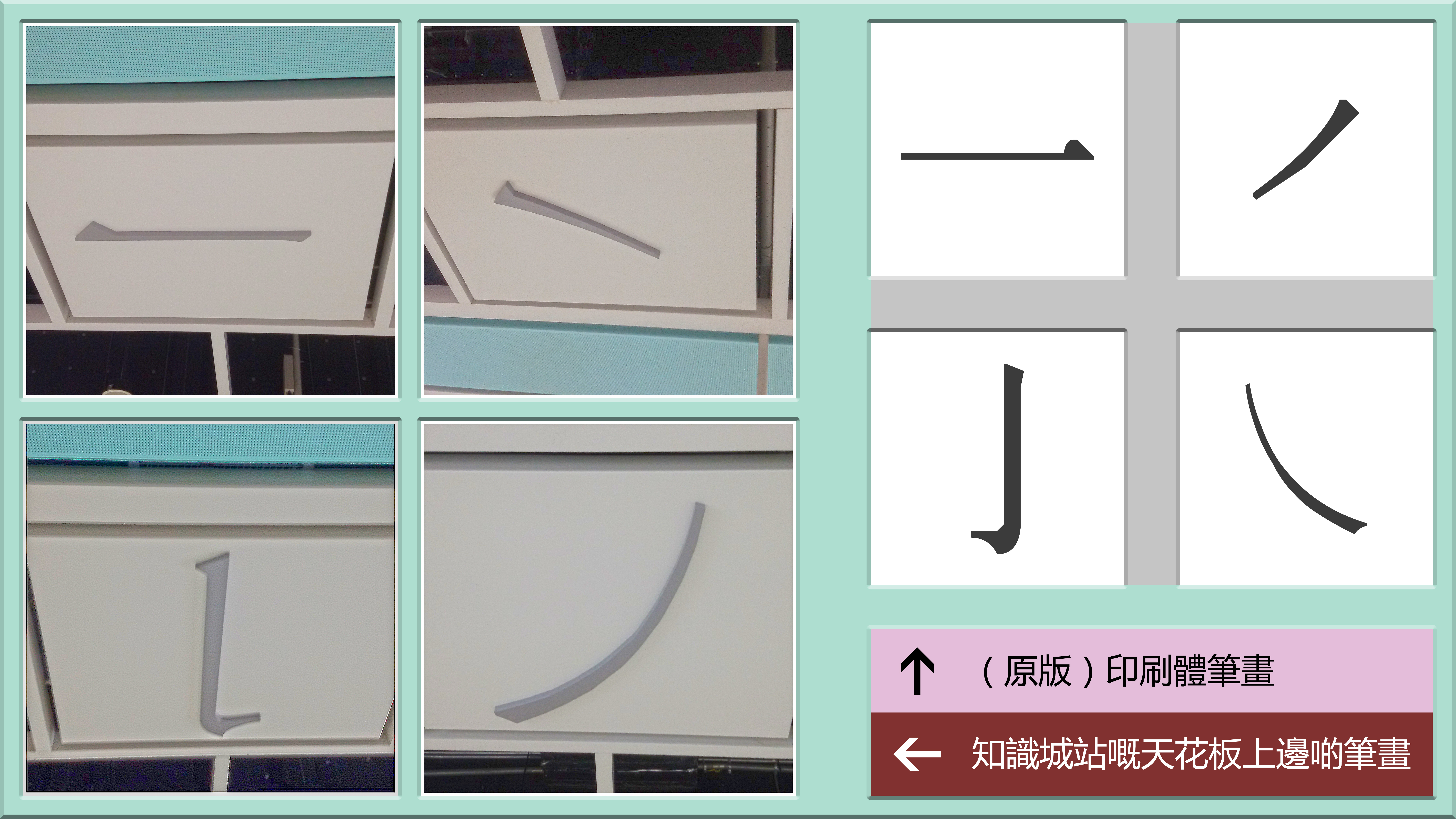 粵語: 知識城站入面嘅天花板裝飾同原版筆畫對比圖